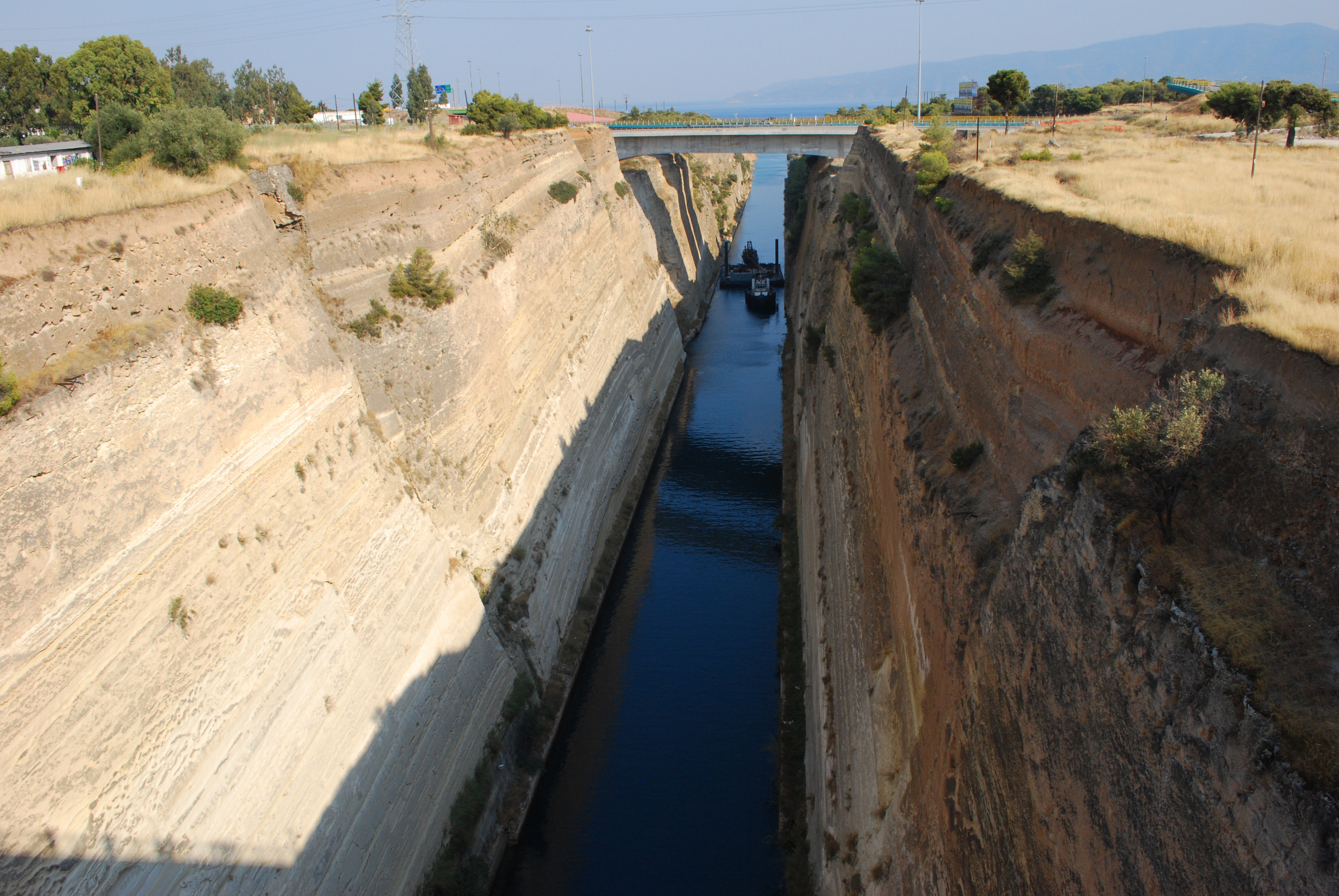 Vue du canal de Corinthe, vers le pont autoroutier et le golfe Saronique.